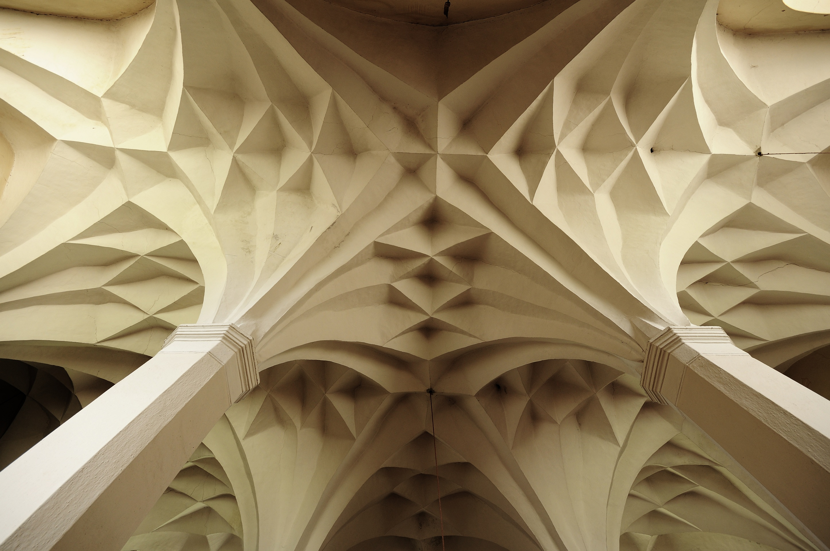 Kostel Nanebevzetí Panny Marie, pozdně gotická sklípková klenba v lodi kostela Nezamyslice (okres Klatovy).